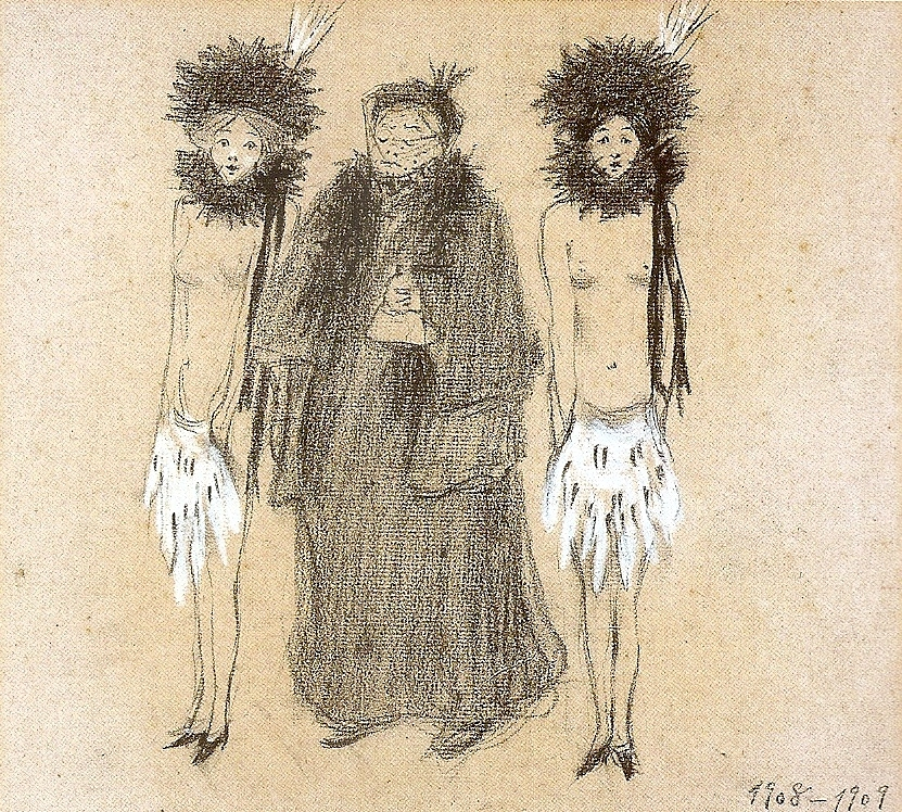 Les guerreres, 1908-1909 Carbó i pastel sobre paper. 26 x 28 cms. Col·lecció Carme Vidal de Martín